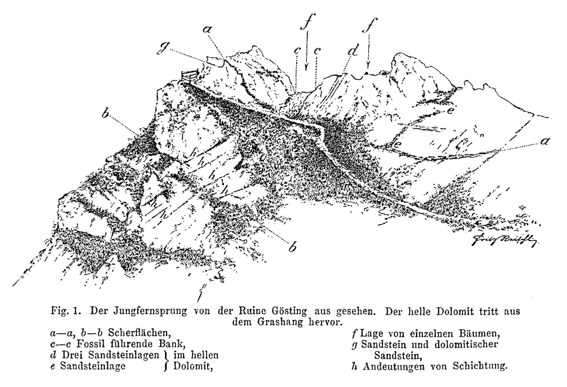 Der Jungfernsprung von der Ruine Gösting aus gesehen.